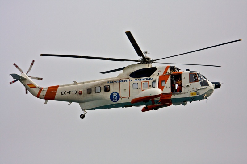 Helicóptero de Salvamento Marítimo español tomando parte en las labores de salvamento del MV Fedra, en Gibraltar.